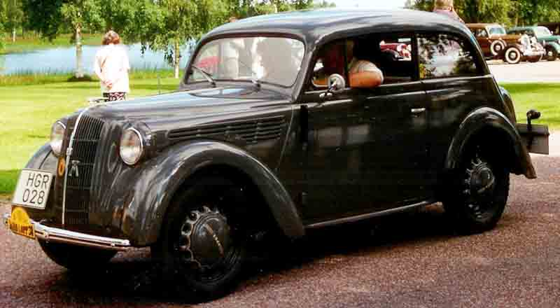 Opel Kadett Limousine 1937